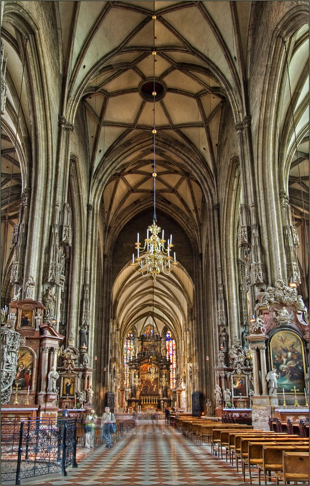 Innenansicht des Stephansdoms